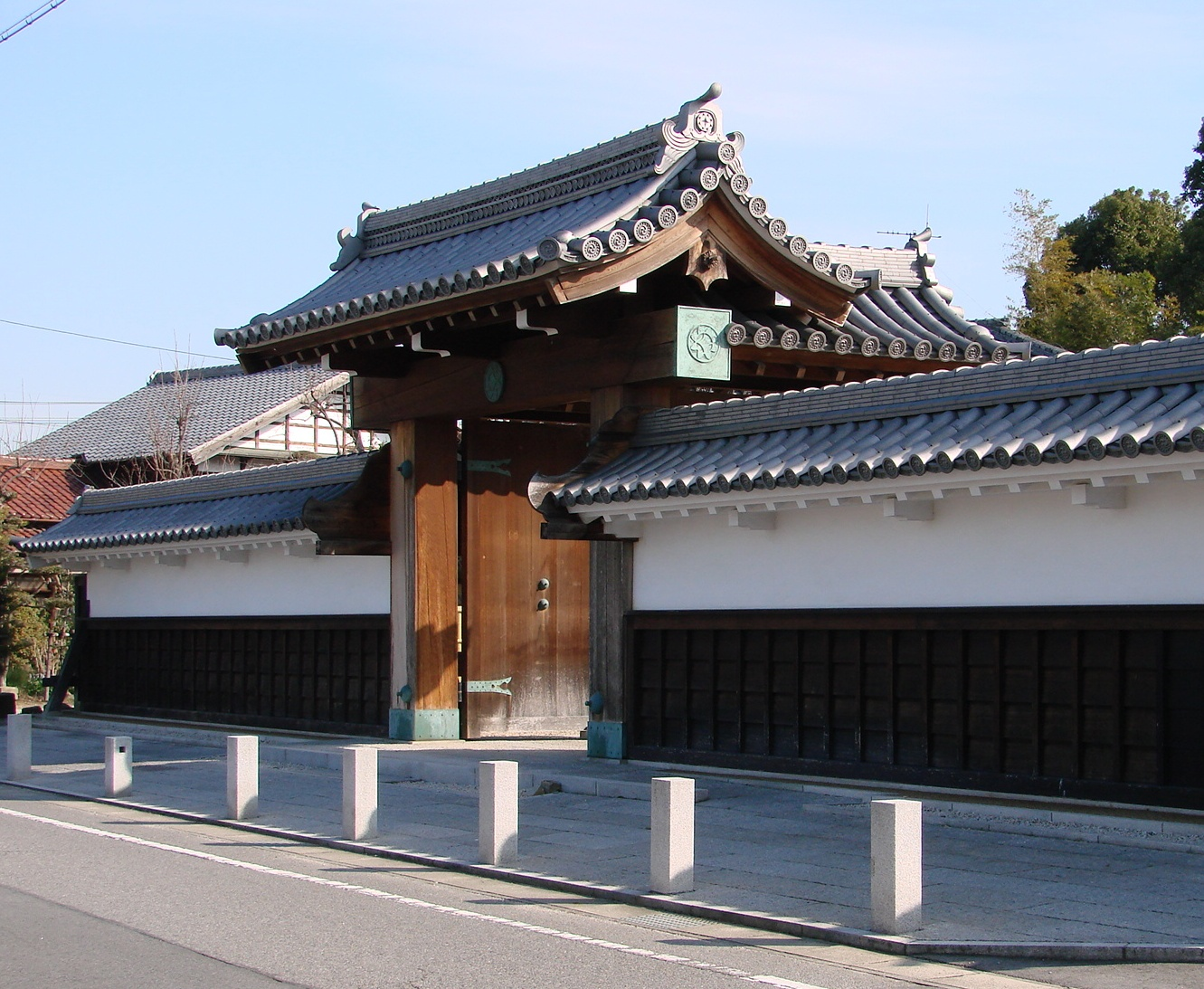 Site of Nishi-Ohira Jinja, Okazaki, Aichi, Japan